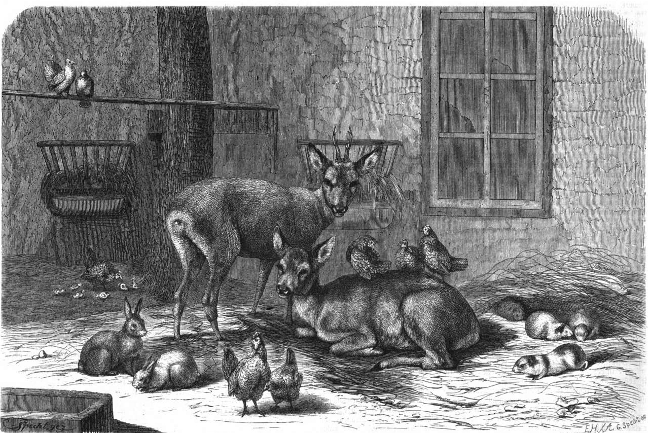 Specht: Der zoologische Garten in Stuttgart. Der Rehzwinger im zoologischen Garten von Gustav Werner, Zeichnung, 1864 oder früher.